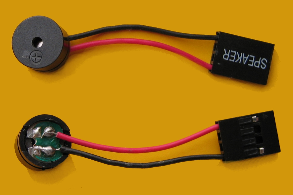 PC-Speaker